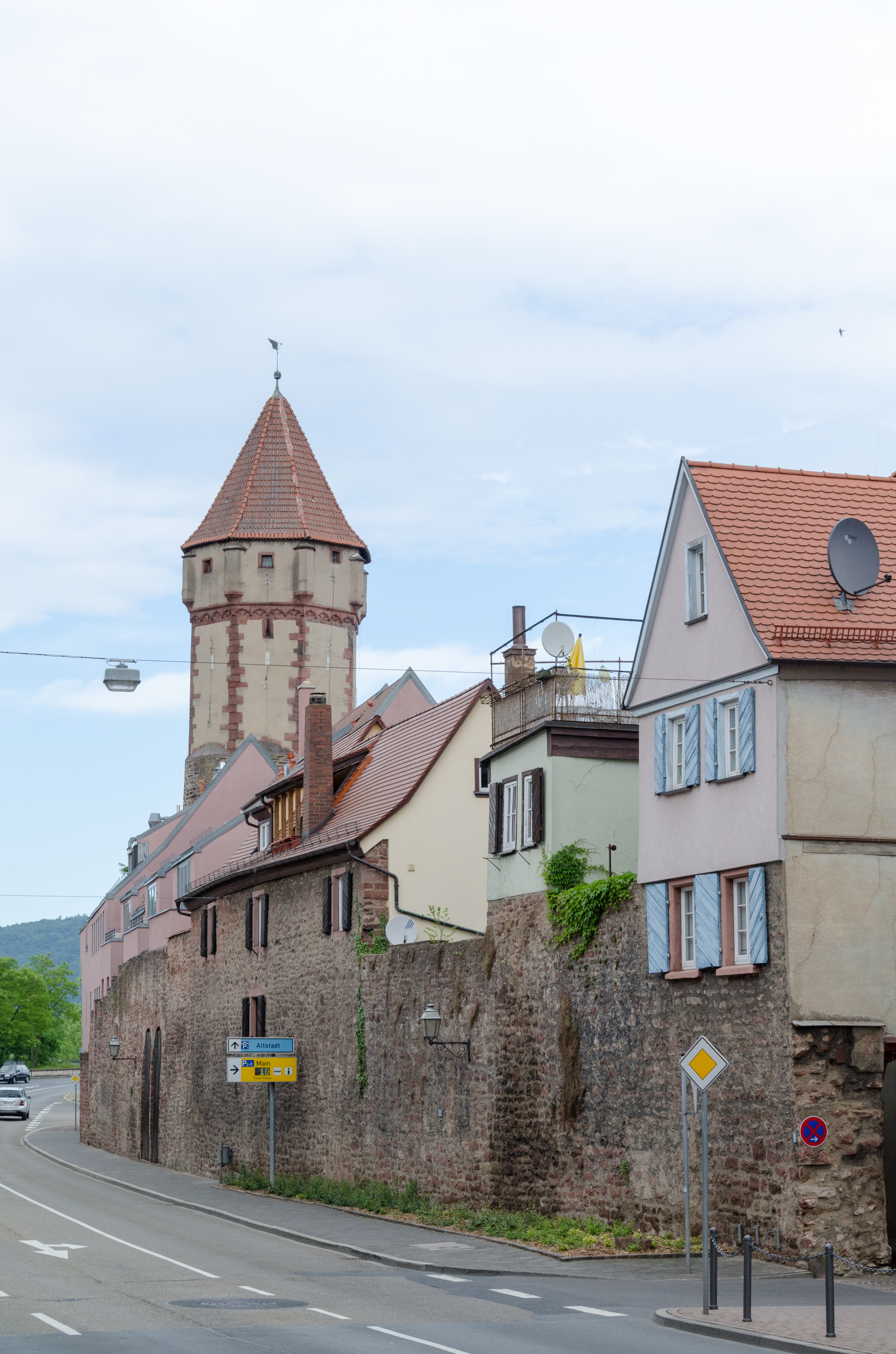 Wertheim, Stadtmauer, Rechte Tauberstraße